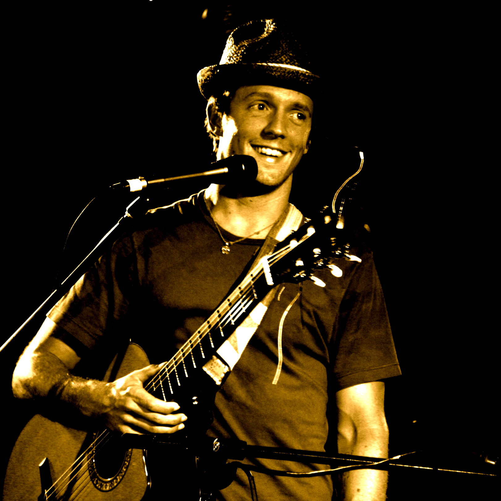 Jason Mraz en concert à Melbourne en 2008.